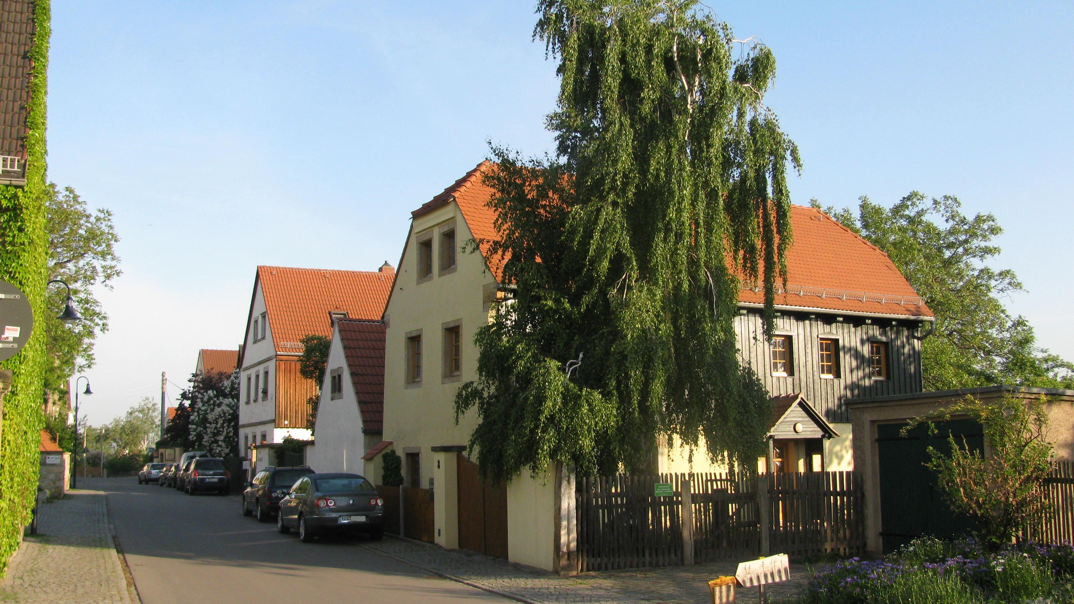 Gebäude im Dorfkern von Niedergohlis, Gemarkung in der Ortschaft Cossebaude, Landeshauptstadt Dresden. Links und Mitte: Dorfstraße 10; rechts: Dorfstraße 8